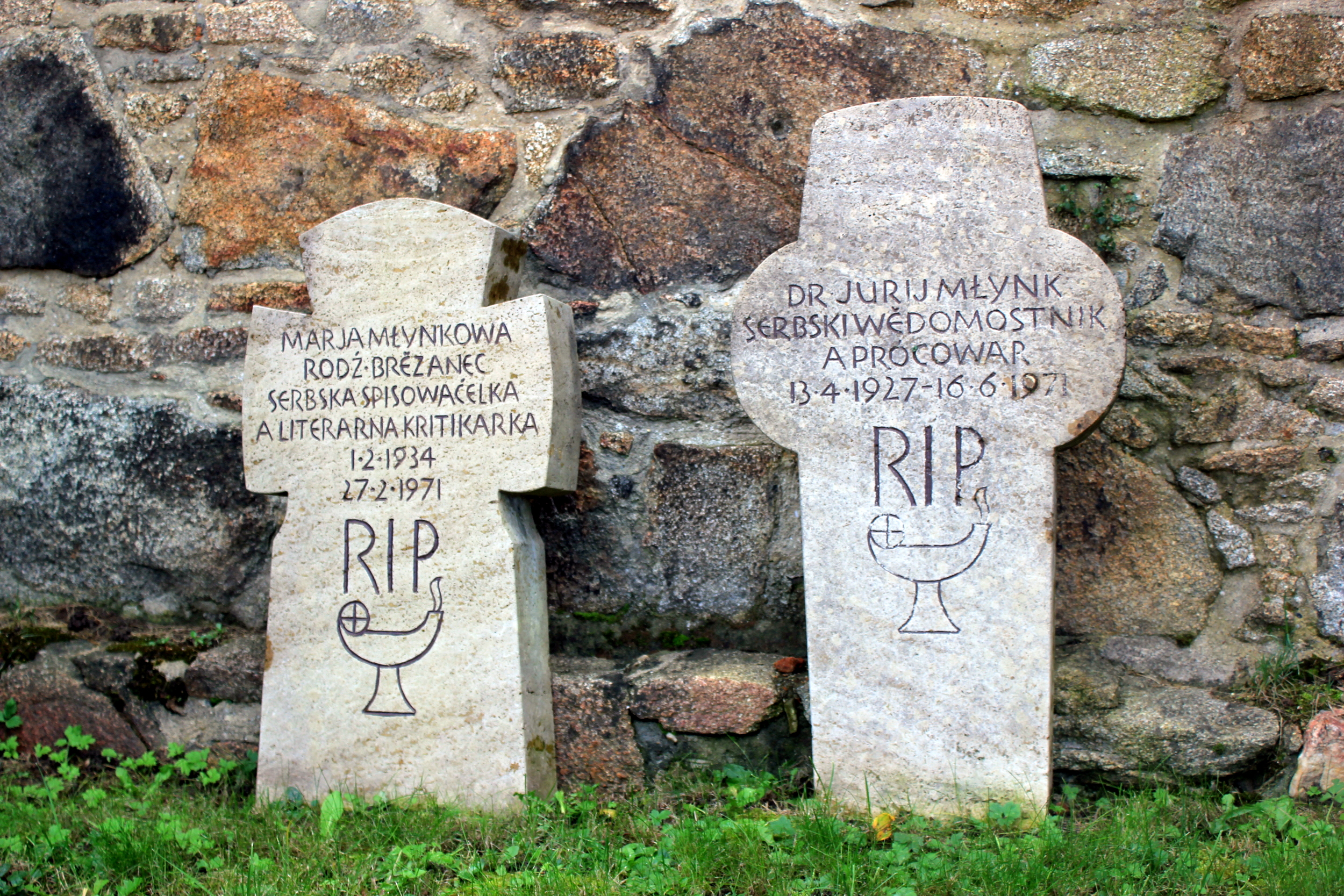 Hornjoserbsce: Row Marje a Jurja Młynkec na Budyskim Mikławšku.